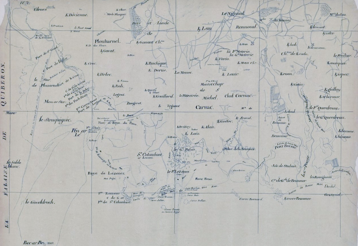 Carte de Carnac publiée entre 1771 et 1785 ( donc avant l'aménagement de son littoral)